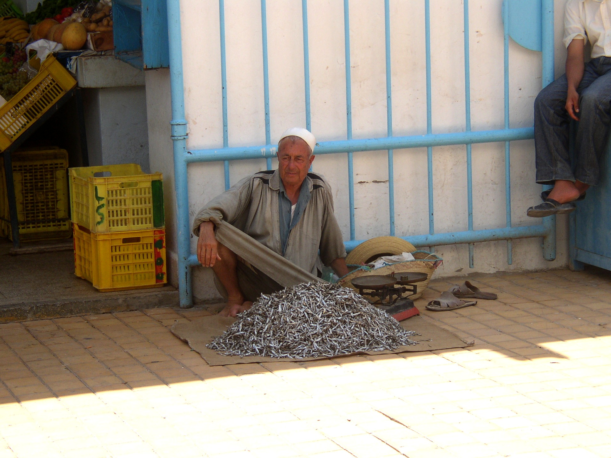 Vendeur de poissons séchés à Djerba